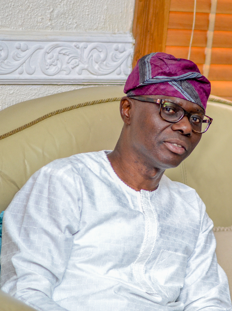 Babajide Sanwaolu 2019